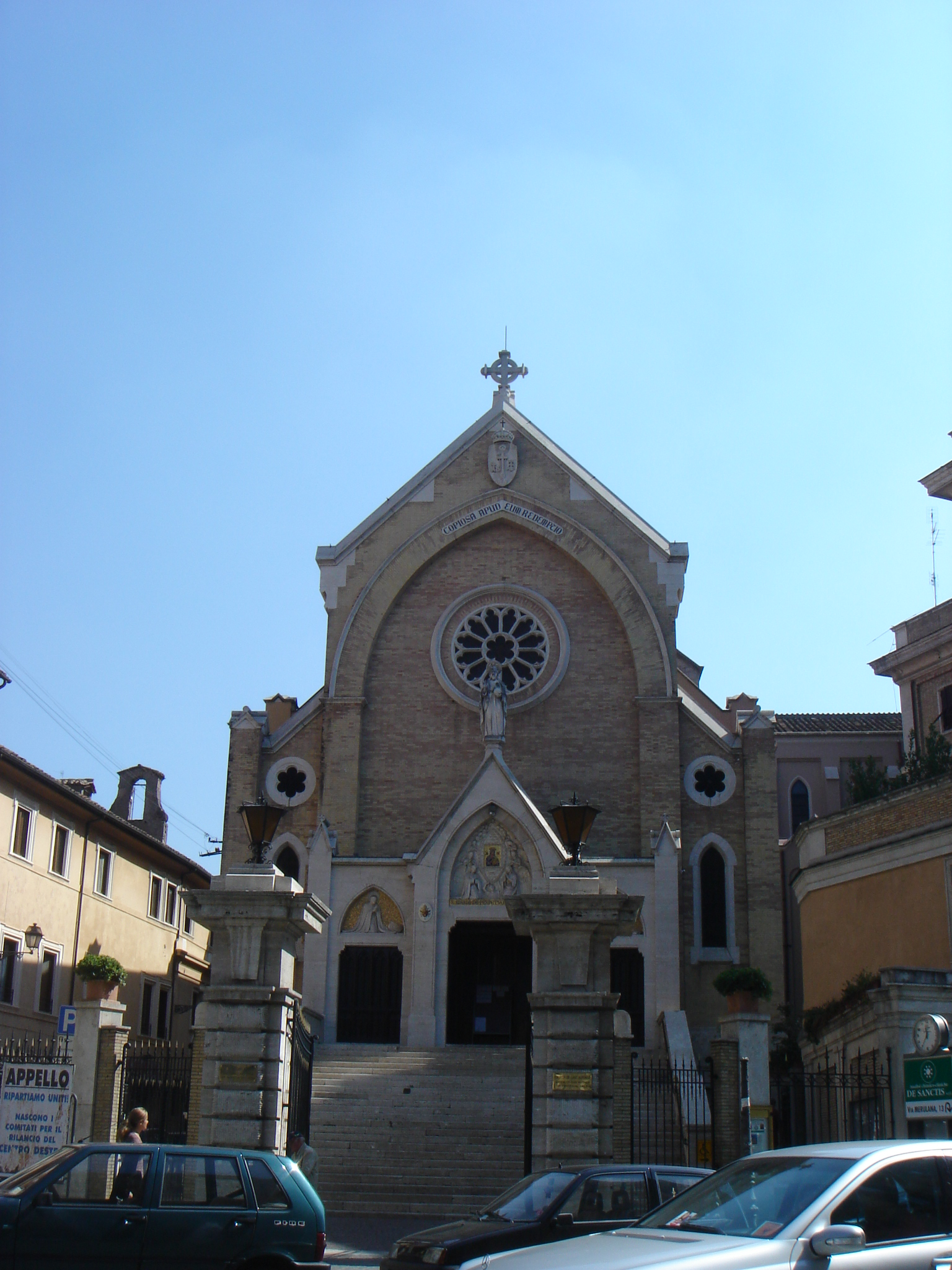 Roma, Sant'Alfonso de Liguori a via Merulana